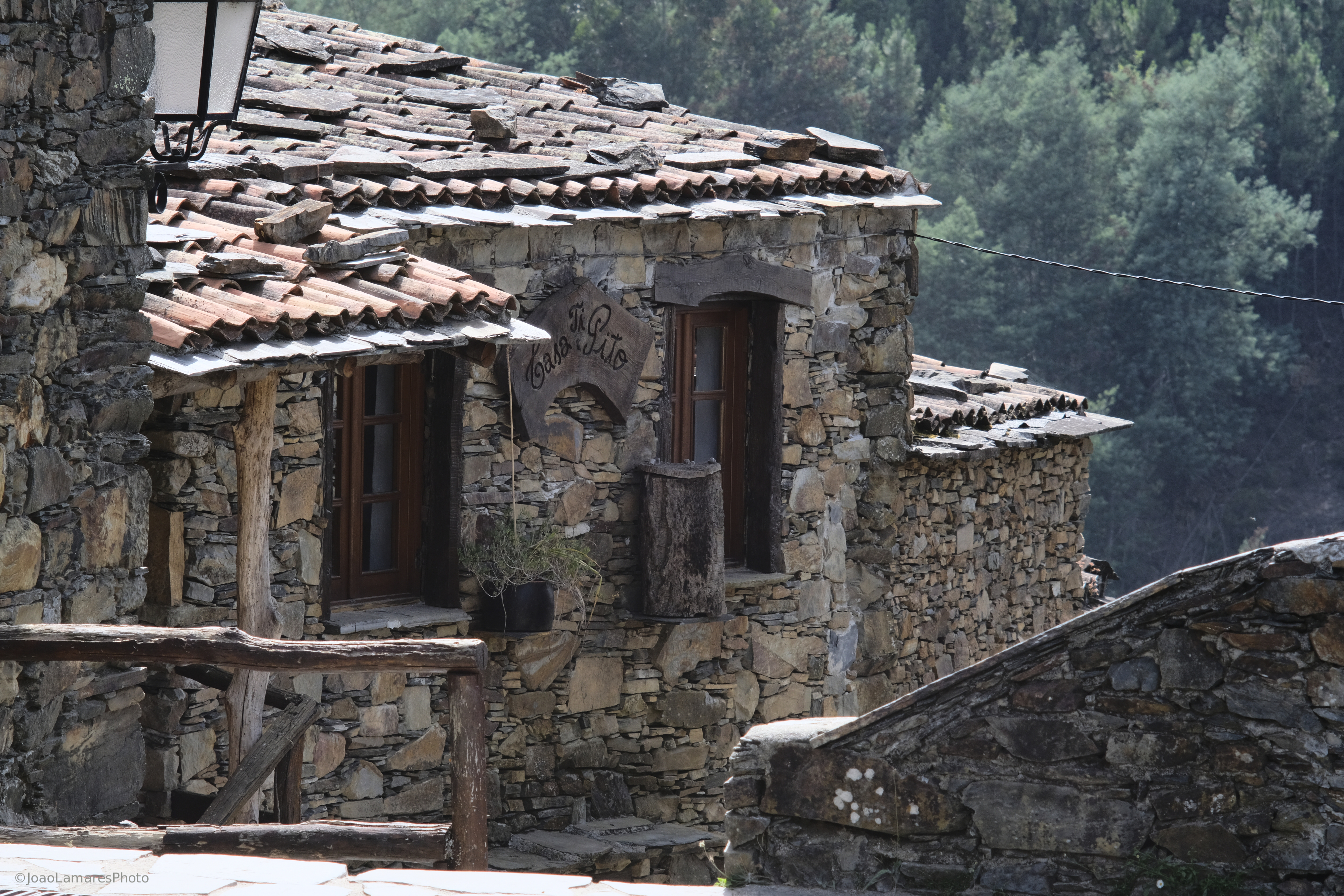 Serra da Lousã, Talasnal, Aldeias de Xisto. O Talasnal é uma aldeia serrana da Serra da Lousã,[1][2] situada no concelho da Lousã, freguesia da Lousã e Vilarinho.[3][4][5] A aldeia está integrada na Rede das Aldeias do Xisto[6] e faz parte da lista de Sítio de Importância Comunitária Serra da Lousã - Rede Natura 2000. Integra a União de freguesias de Lousã e Vilarinho[7] ... Pensa-se que a fundação desta aldeia assim como das que a rodeiam deve ter acontecido algures pela 2ª metade do século XVII ou pelo começo do século XVIII, chega-se a esta conclusão porque no Cadastro da população do reino (1527) não faz menção alguma a estas aldeias o que sugere que até à fixação das gentes a ocupação seria realizada por pastores nas estações da primavera e do verão. A primeira referência ao Talasnal provem de uma multa executada pela Câmara da Lousã em 1679. (Wipedia; Talasnal) This is a photography of a protected area of Portugal indexed in the World Database on Protected Areas with the ID: 555531128 (WDPA)